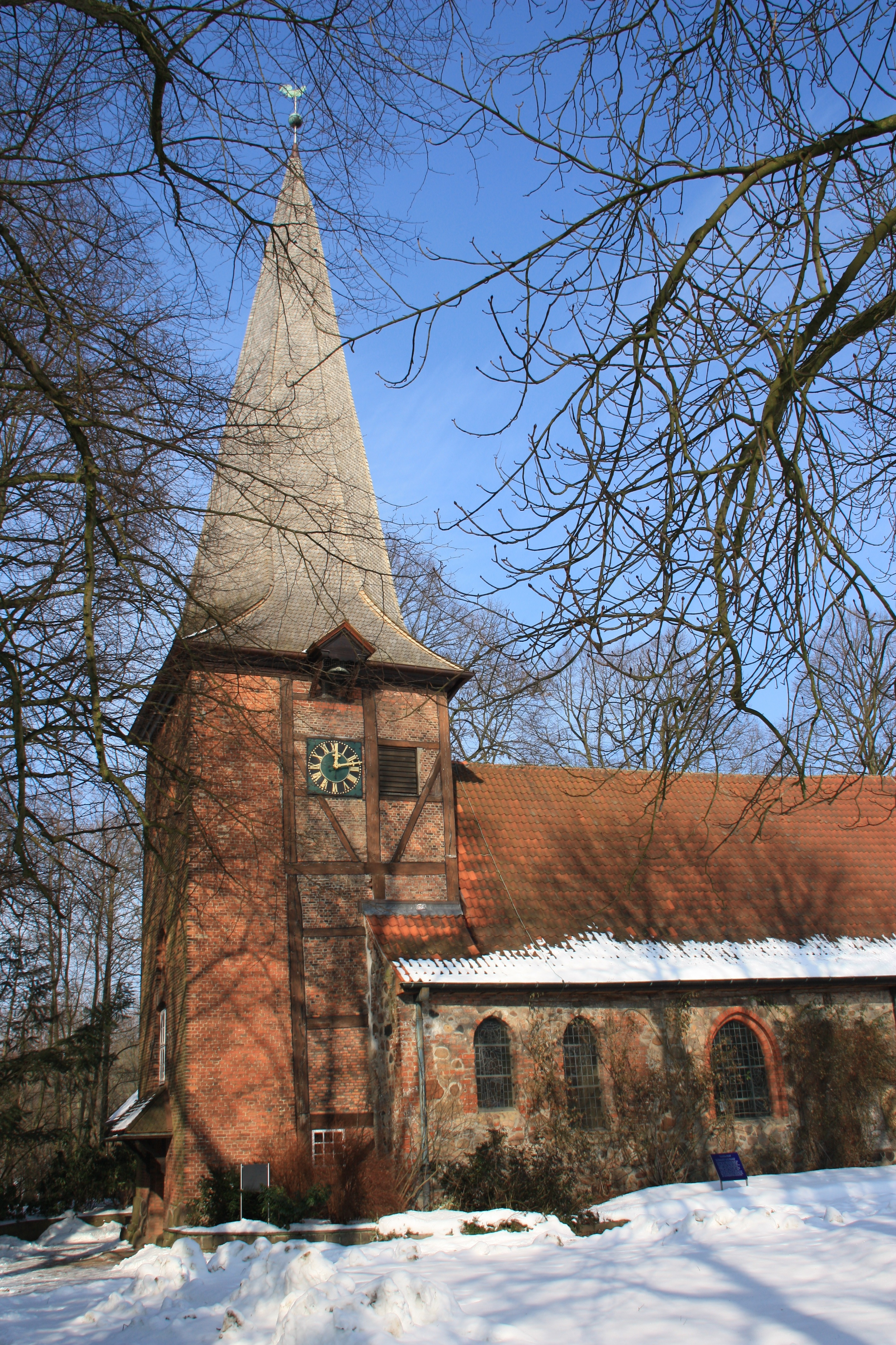 Kirche Alt-Rahlstedt im Winter